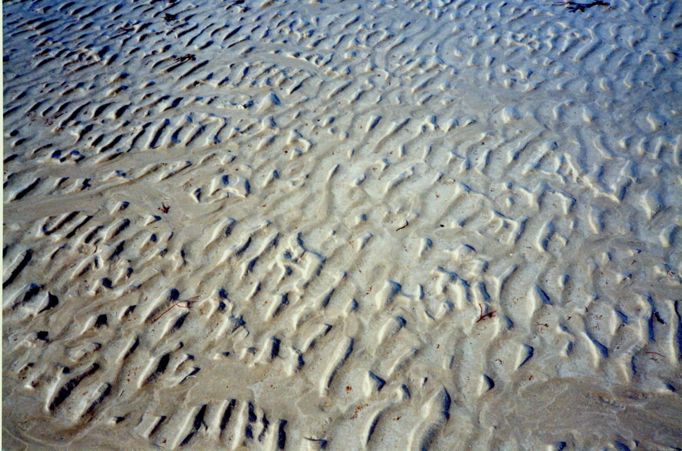 Sables de la Baie de Somme (France)d'après lesquels le peintre Alfred Manessier a réalisé au début des années 1980 une série de lavis.